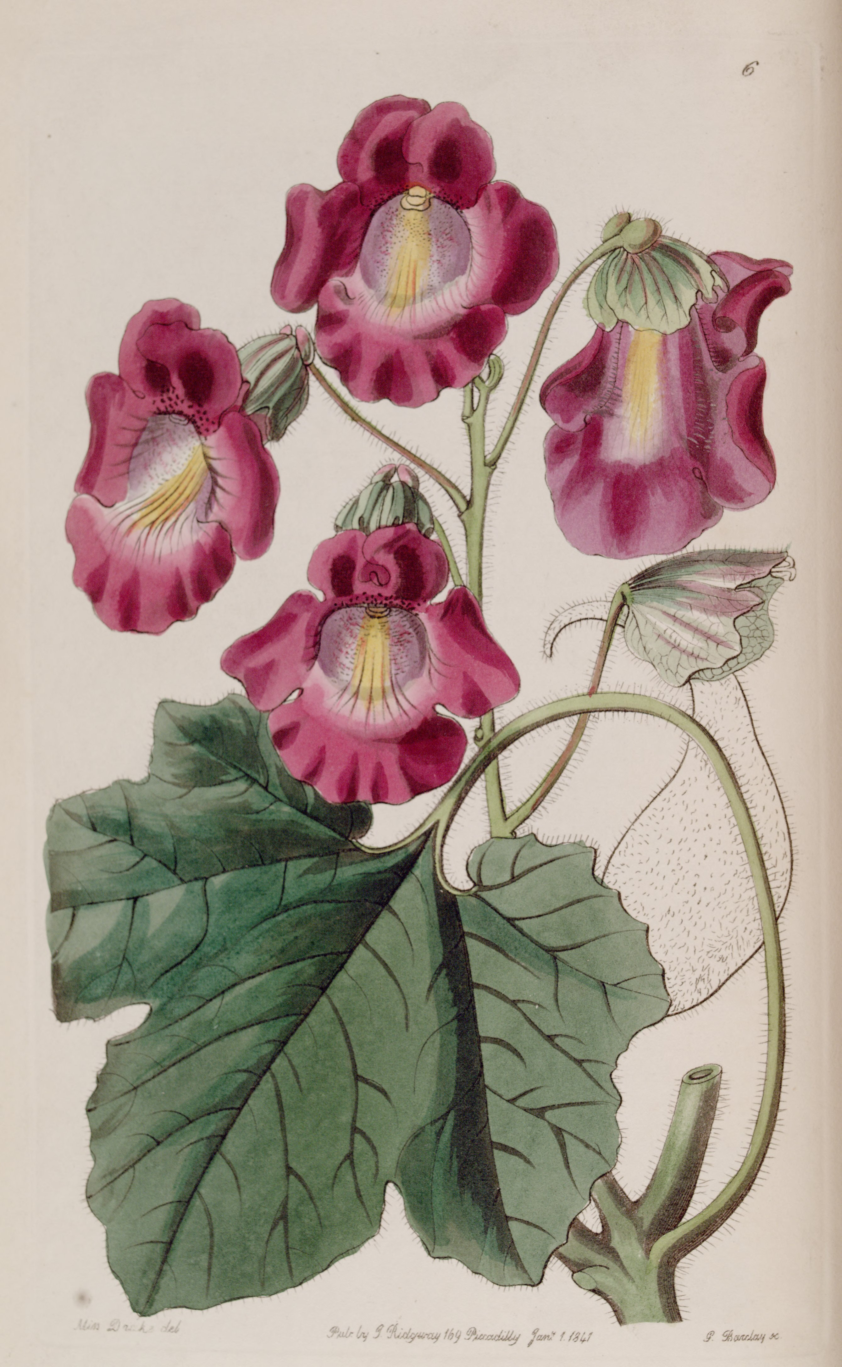 Proboscidea louisianica subsp. fragrans